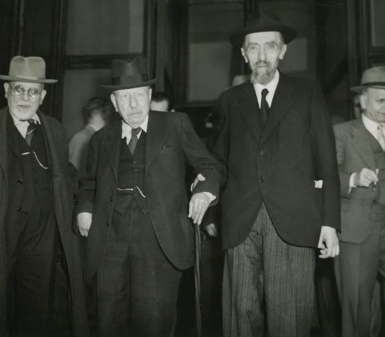 I senatori Alessandro Casati e Benedetto Croce in occasione dell'elezione a Presidente della Repubblica di Einaudi